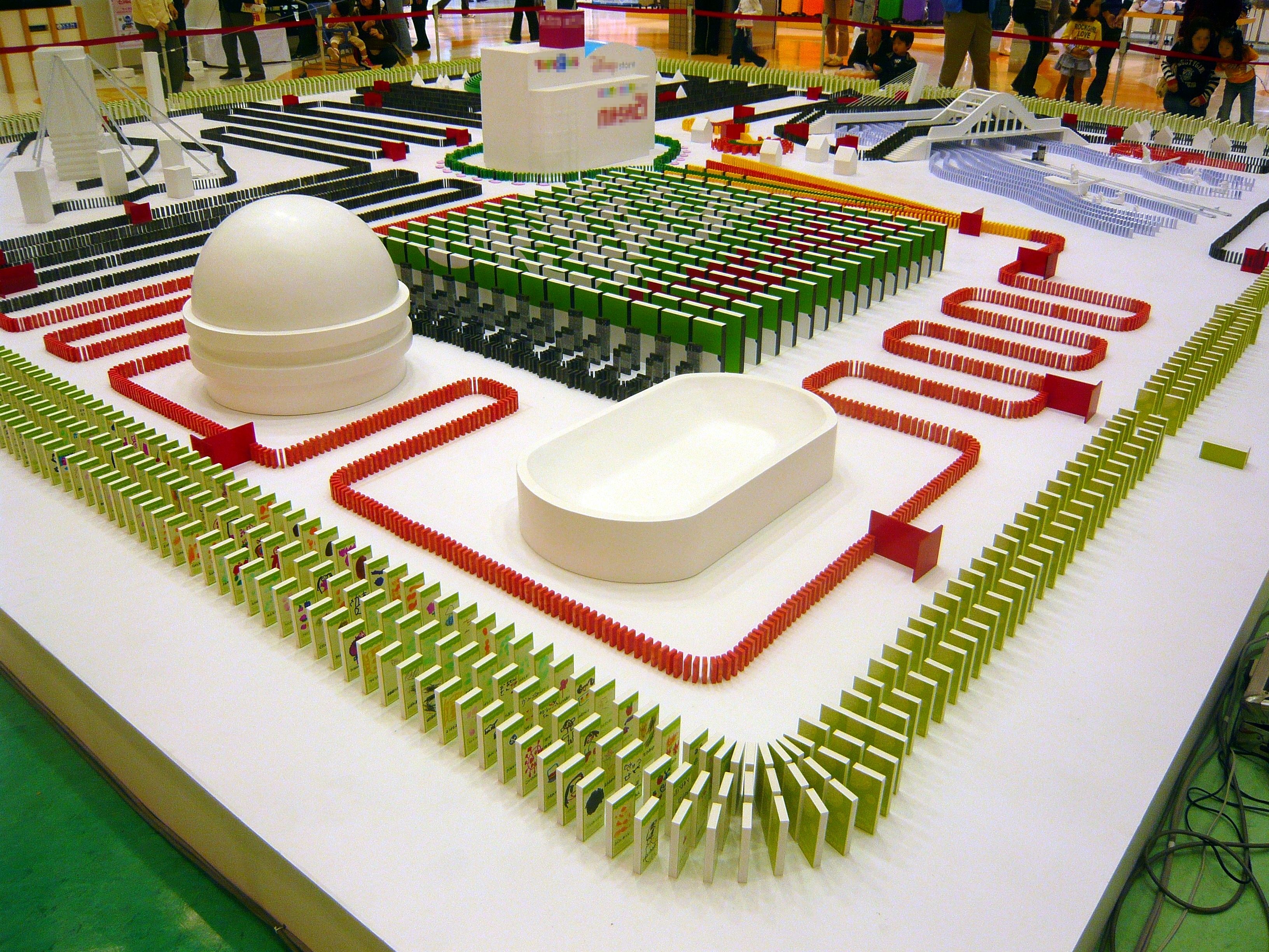 Domino effect ドミノ倒し,Gifu,Gifu,Japan（岐阜県岐阜市）のw:ja:マーサ21で撮影。